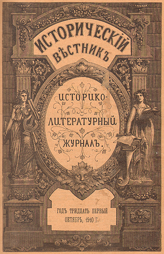 Обложка журнала "Исторический Вестник"